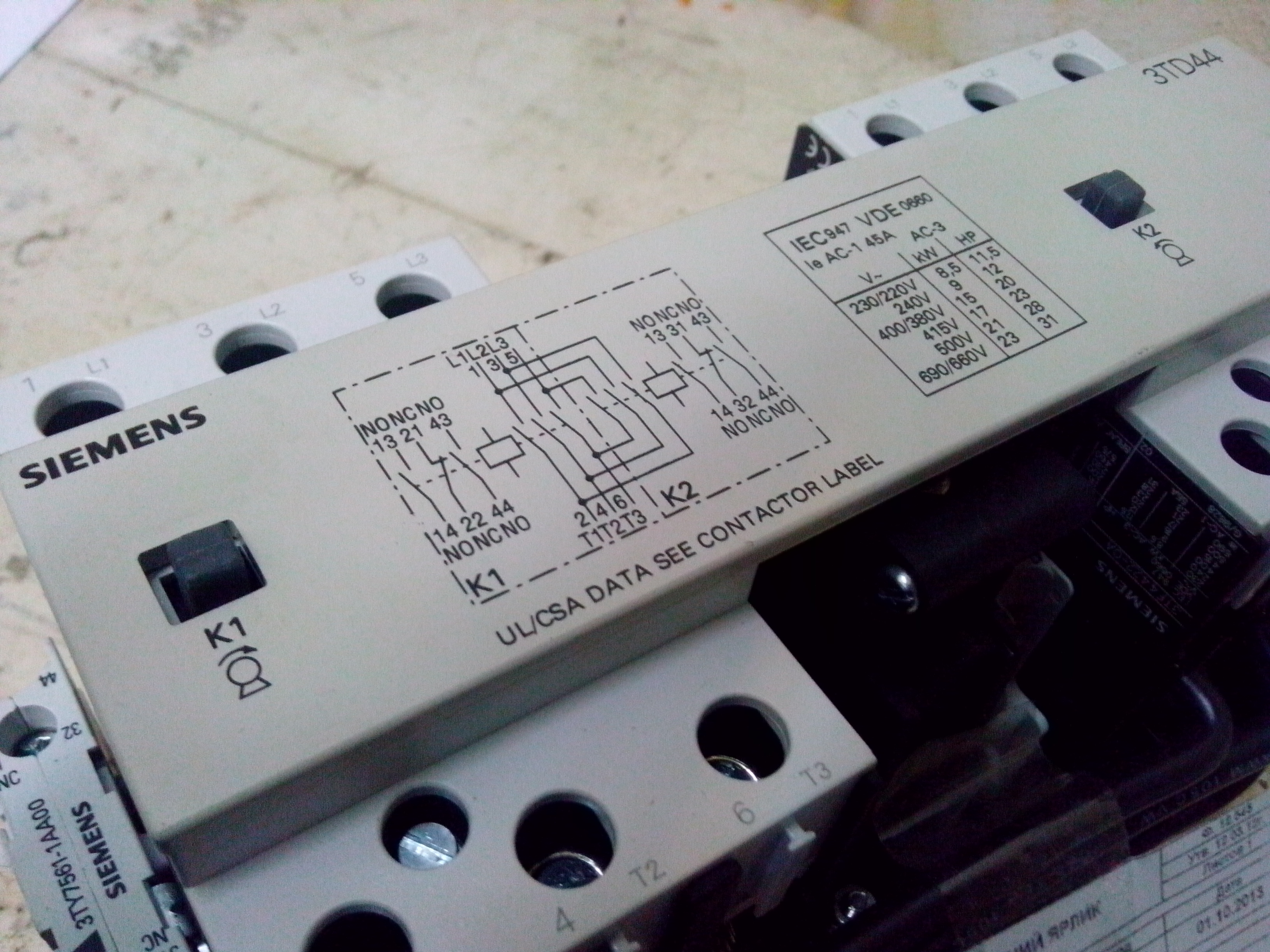 Реверсивная сборка пускателей - комплектное изделие